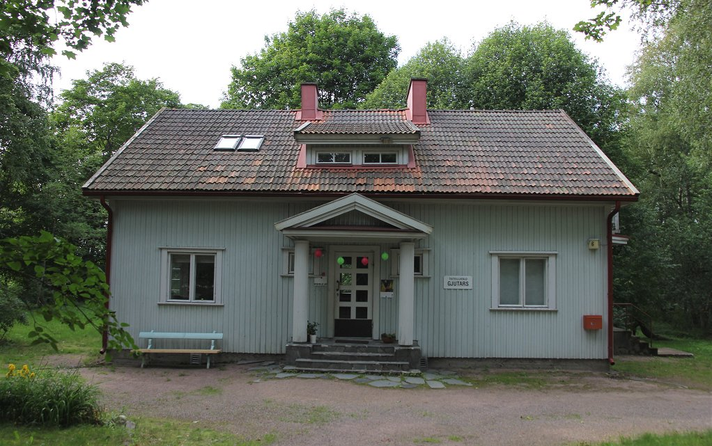 Taiteilijatalo Gjutars on Vantaan taiteilijayhdistyksen Vantaan Kuninkaalan kaupunginosassa (Vanha Kuninkaalantie 6) käytössä oleva ja kunnostama taiteilijatalo.Talossa yhdistyksen jäsenet ovat järjestäneet taidenäyttelyitä, illanviettoja ja muita tilaisuuksia. Taiteilijatalon alakerran 45 neliön laajuisesta galleriatilasta on käytetty nimeä Galleria Gjutars. Lisäksi alakerrassa mm. 15 neliön laajuinen taiteilijan työtila. Taiteilijatalon toisessa kerroksessa sijaitsee studioasunto, joka on kesäisin toiminut ulkomaisten taiteilijoiden residenssinä.